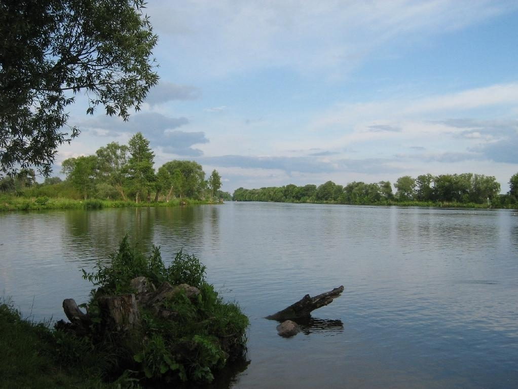 Mündung des Havelkanals in die Havel bei Paretz, Brandenburg.